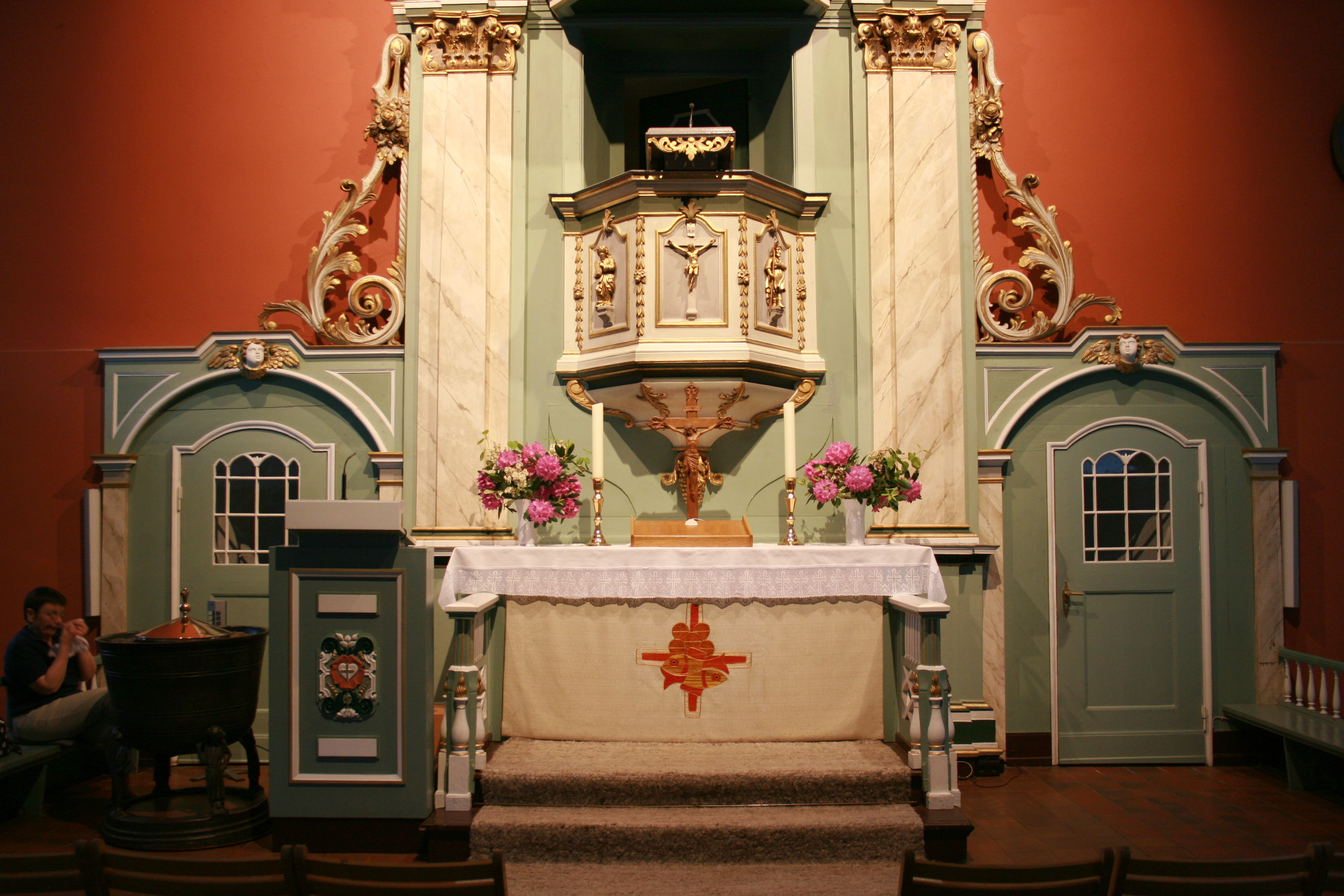 Kirche St. Peter und Paul, Friedenstraße in Schneverdingen